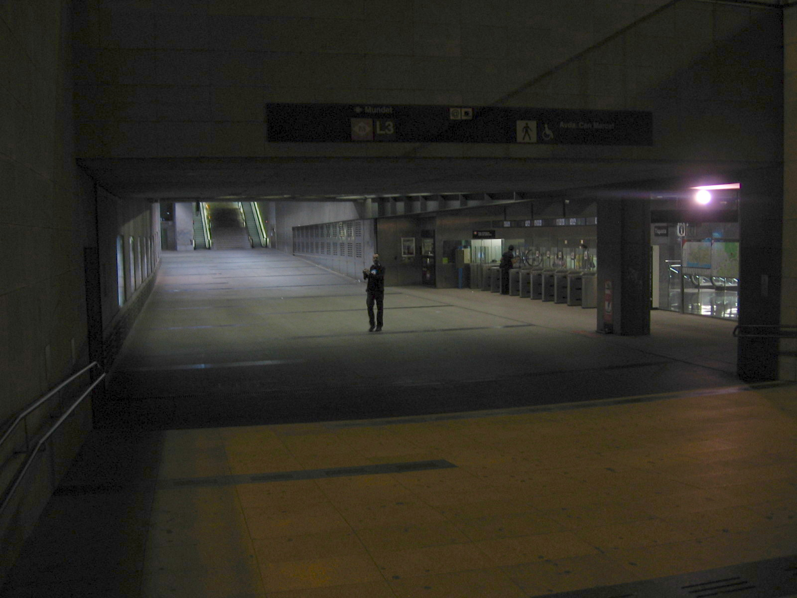 Entrance to Platform of Canyelles station, Barcelona Metro/Entrada a l'estació Canyelles, Barcelona